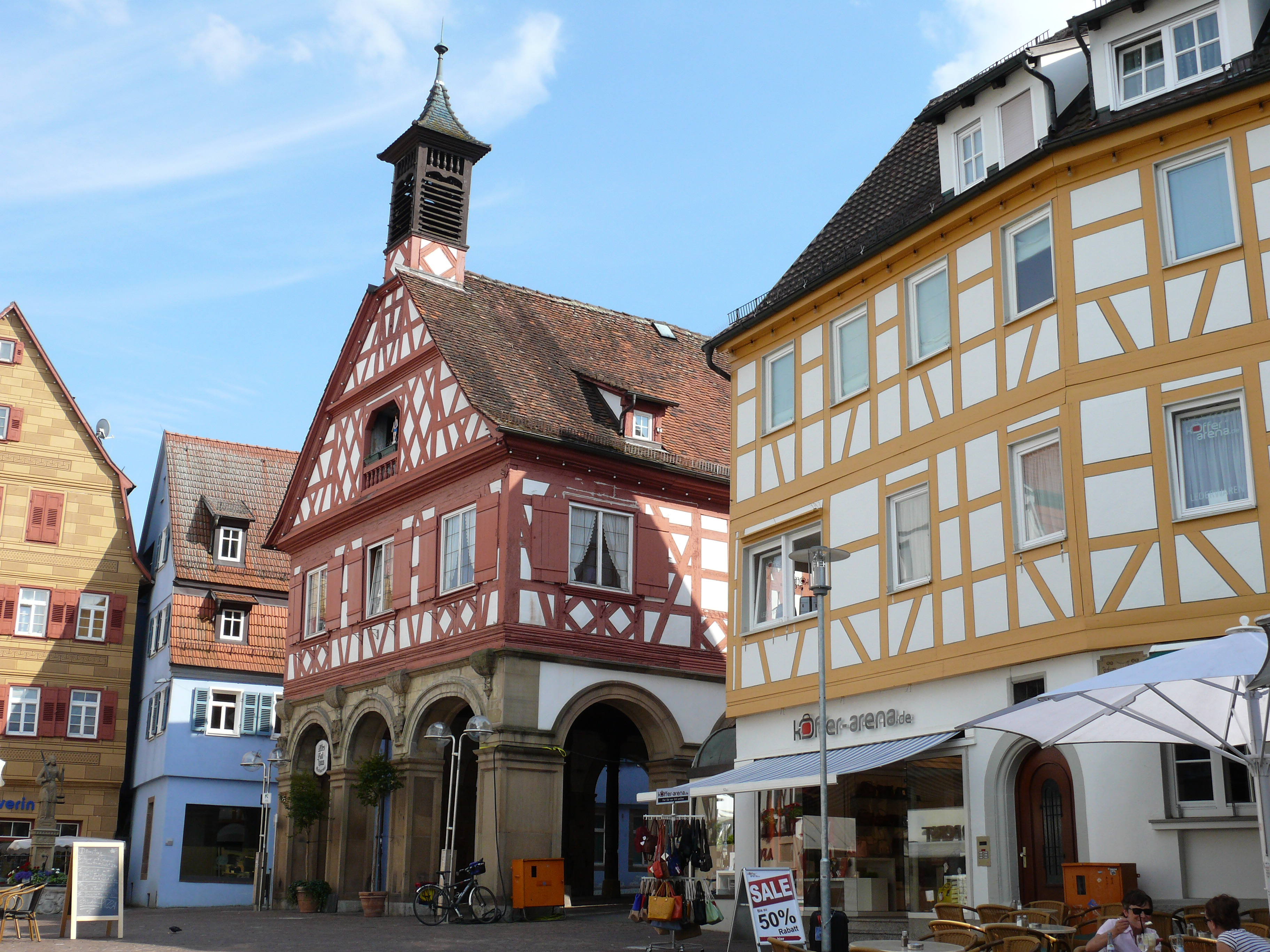 Das Alte Rathaus auf dem Marktplatz in Waiblingen. Blick von Westen.